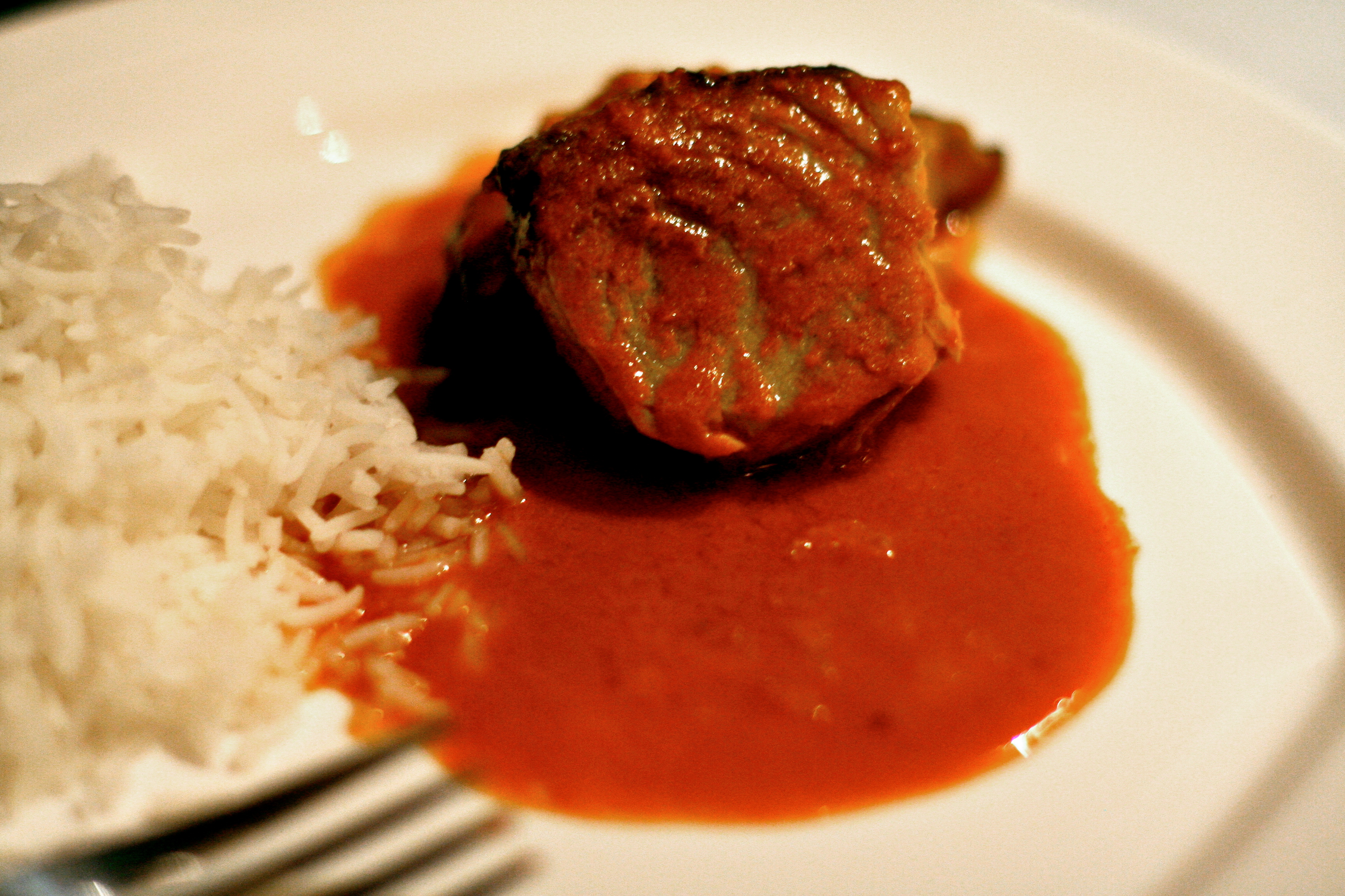 Caril de peixe, um prato de Goa. Goan fish curry.